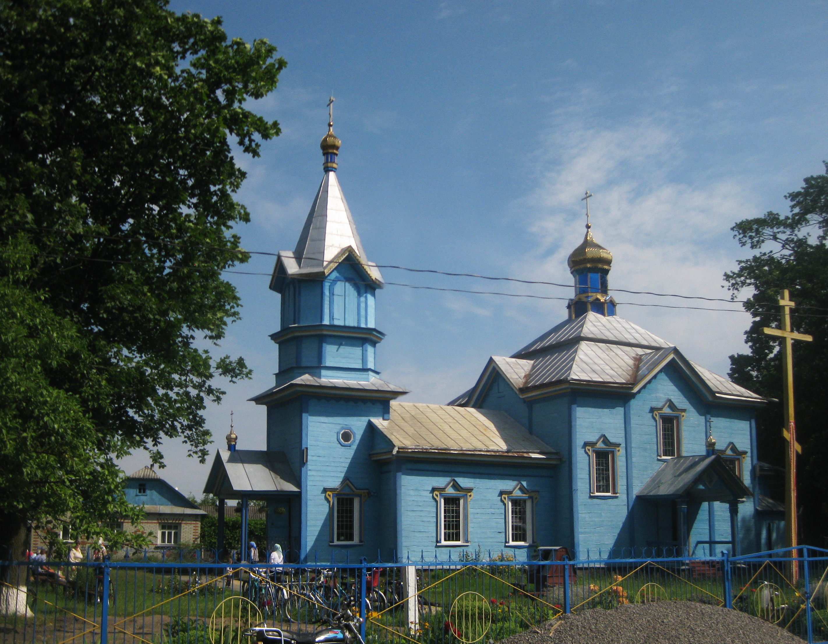 Симеонівська церква (дер.), Любохини